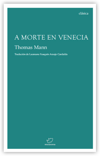 Mann, Thomas, A morte en Venecia (trad., pres. e notas de Laureano Xoaquín Araujo Cardalda), Cangas do Morrazo, Rinoceronte, Colección Clásica, 14, 2015